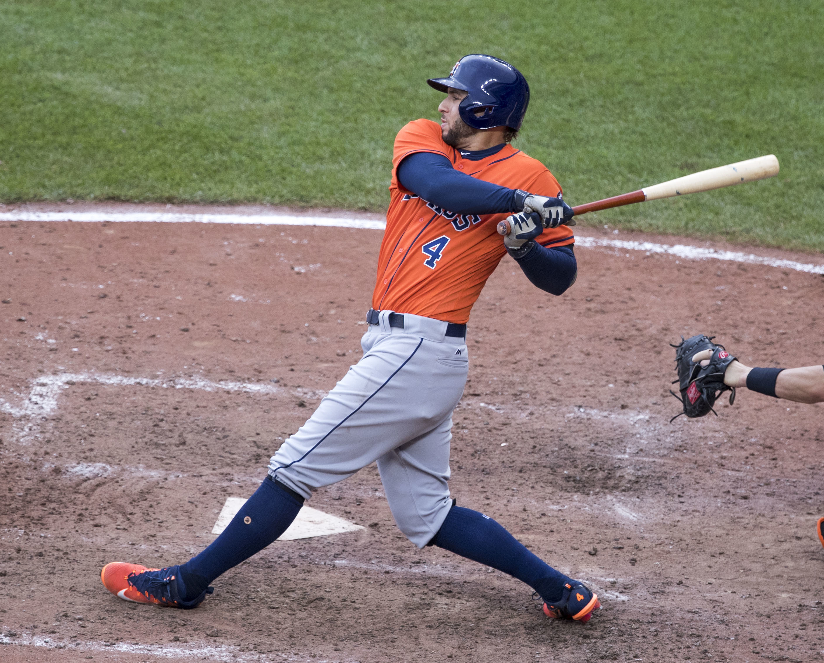 Astros at Orioles 7/23/17